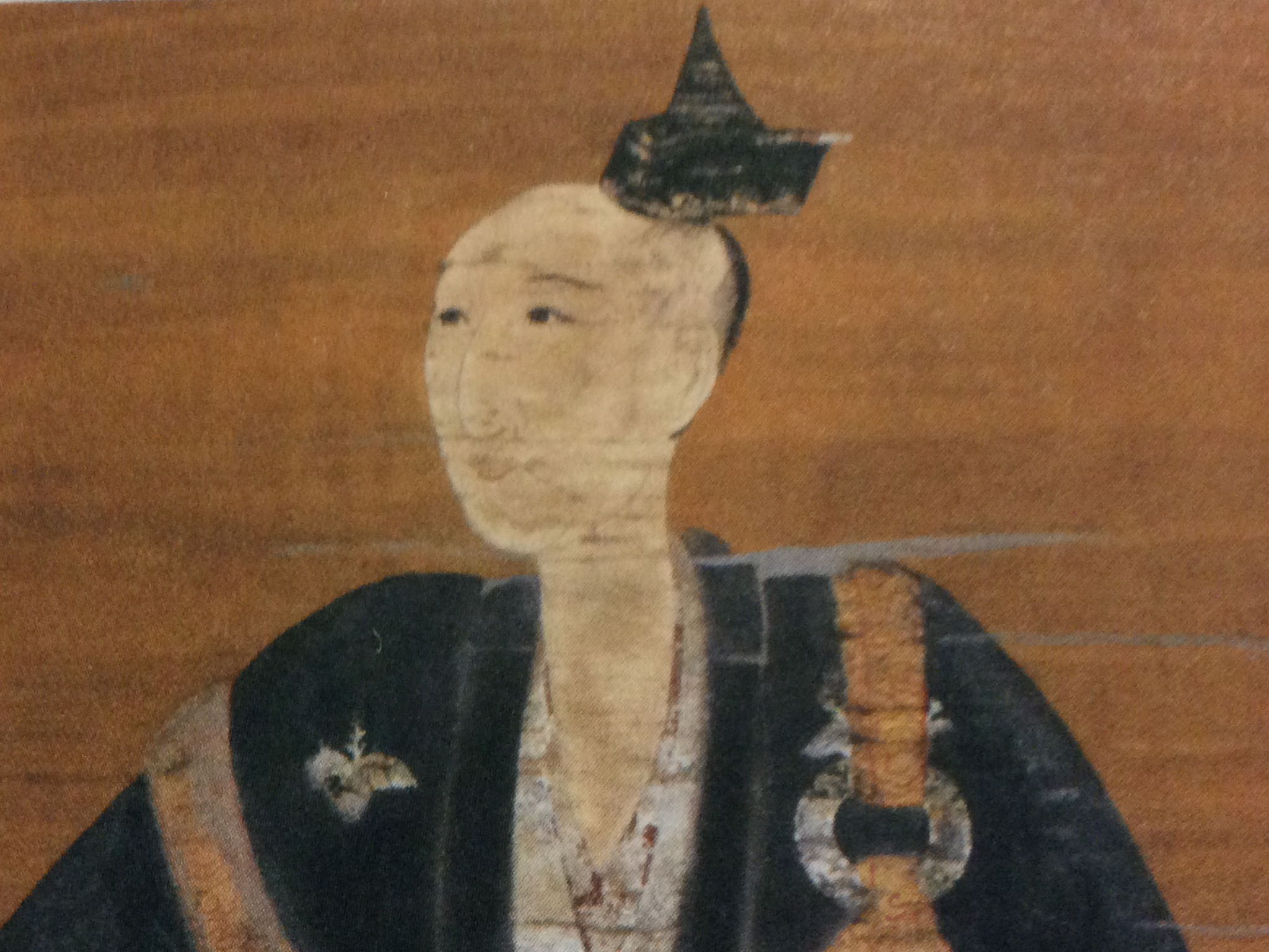 東京大学史料編纂所所蔵、模写 作者不詳 江戸時代以前の創作か